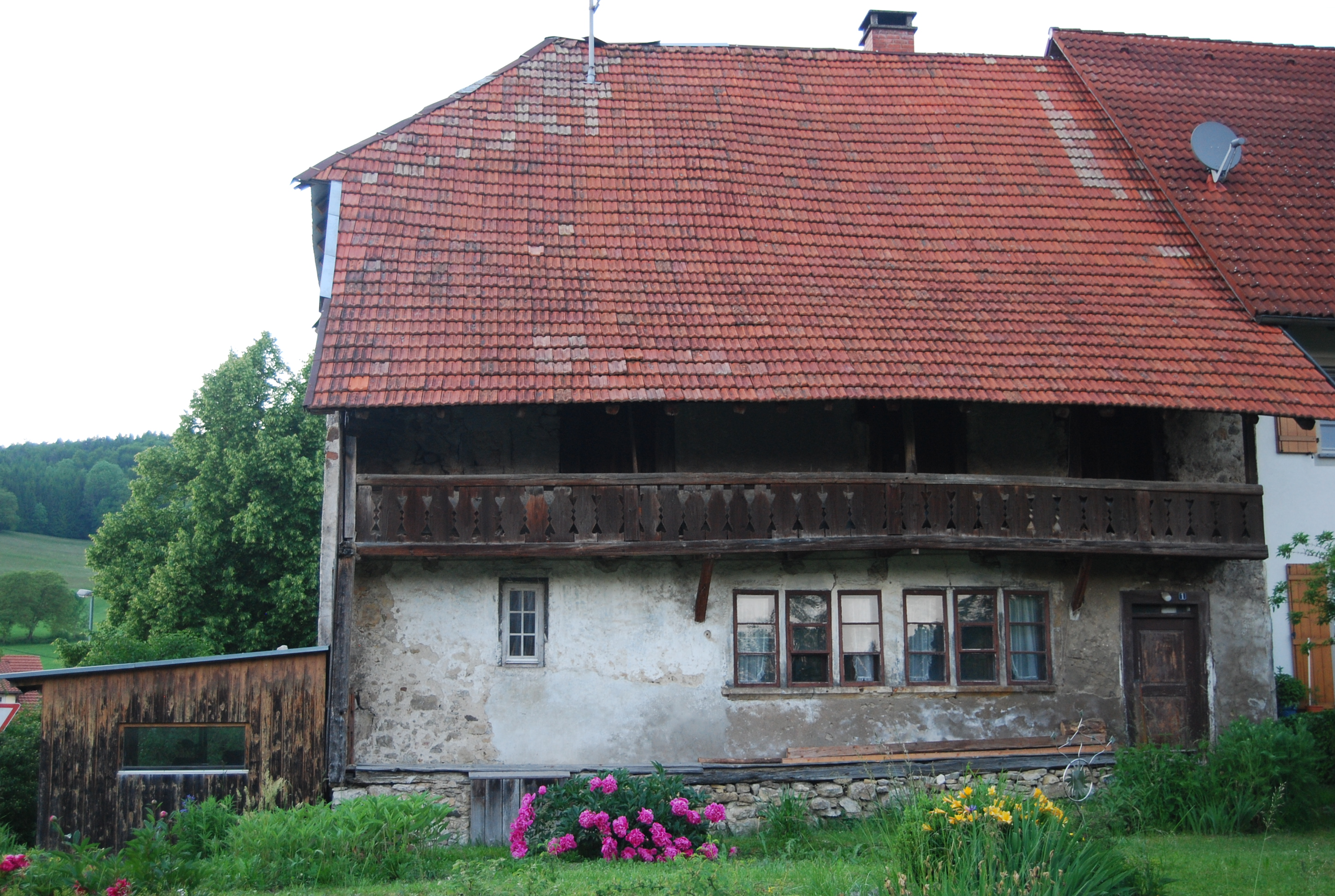 Altes Bauernhaus in Birkingen